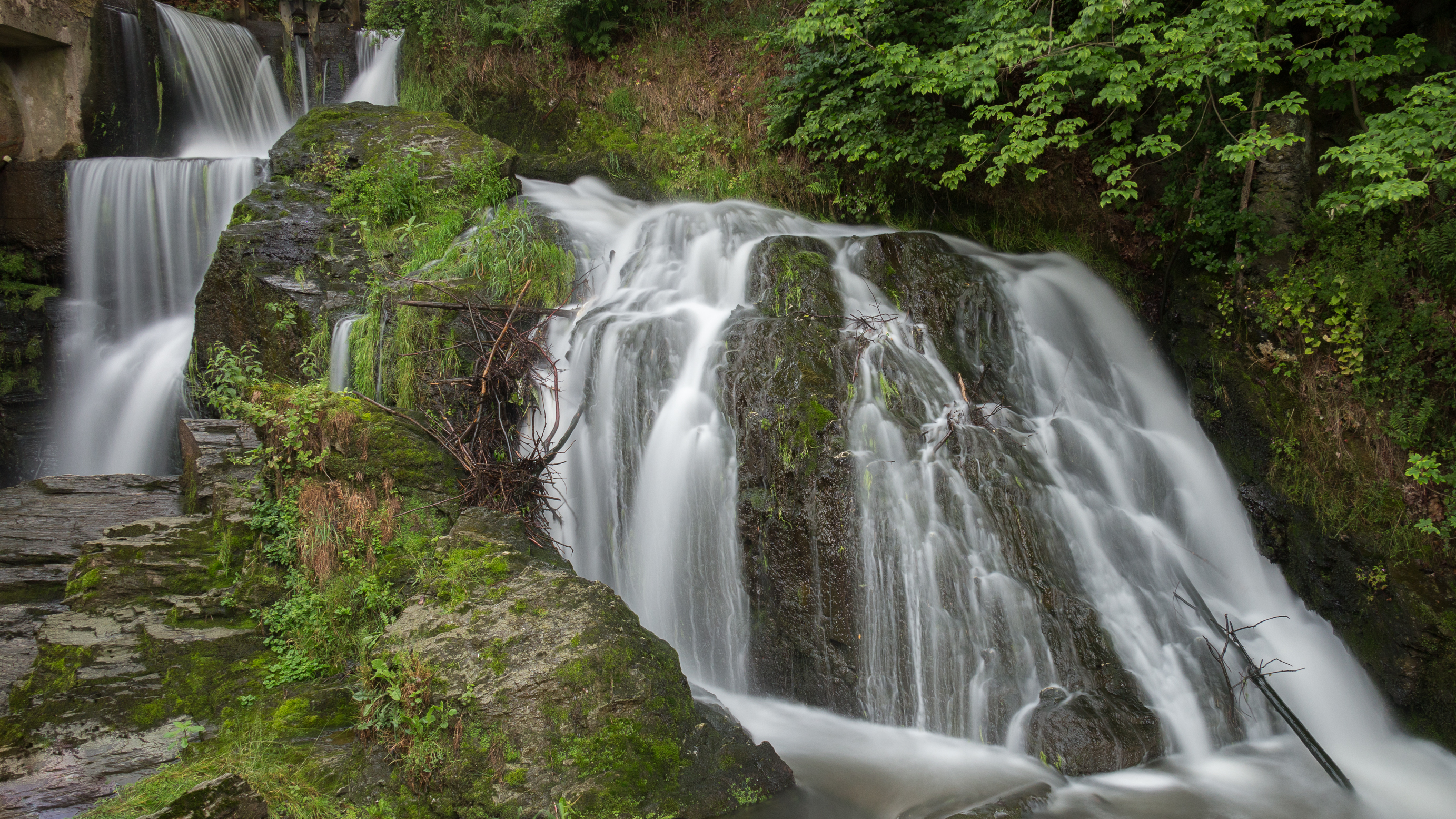 Der Wasserfall in Adolfseck